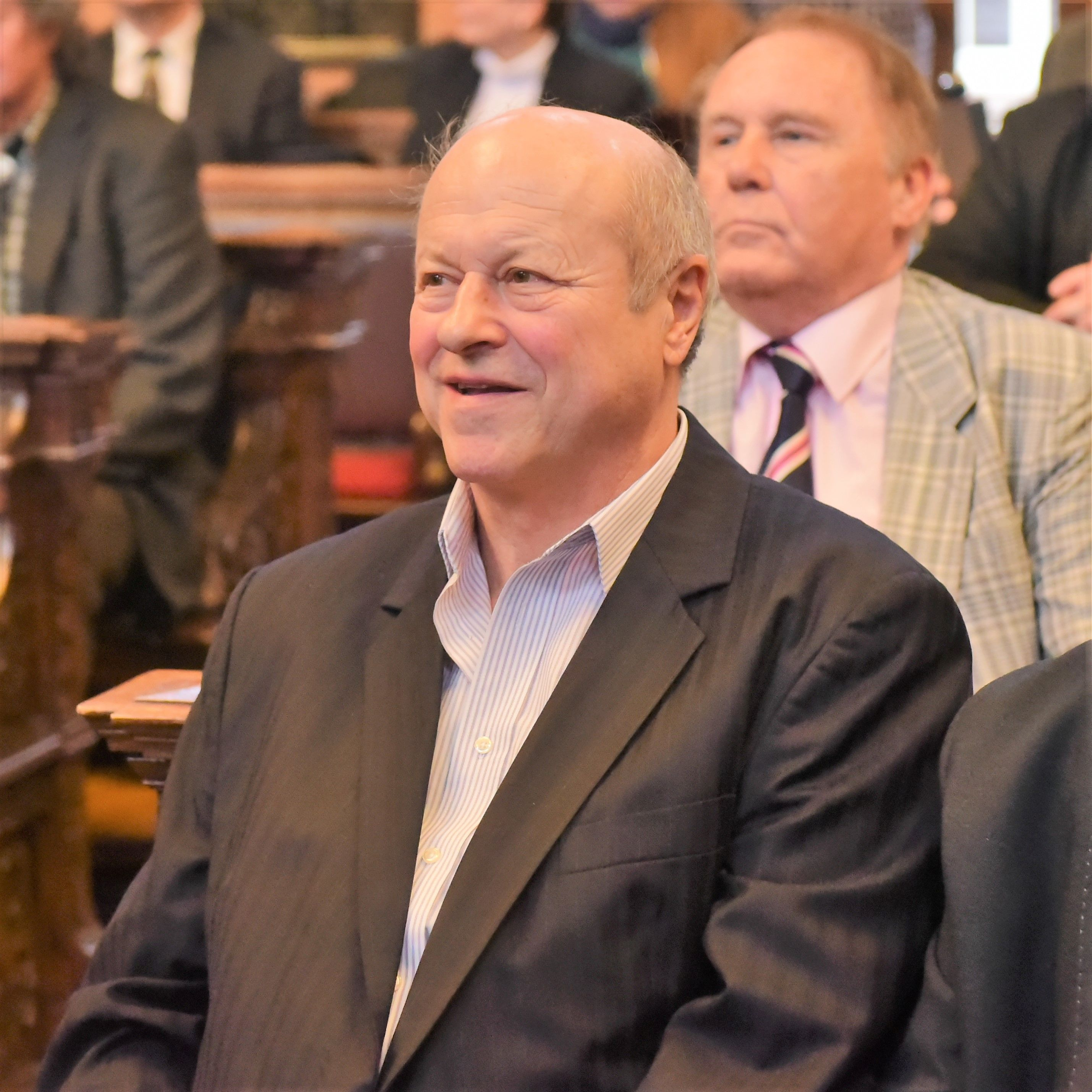 Jónyer István négyszeres világbajnok magyar asztaliteniszező